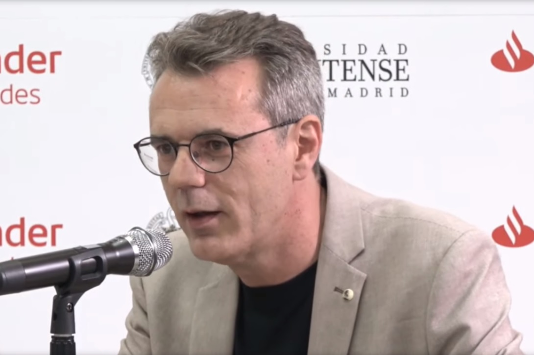 Cursos de verano de la Universidad Complutense de Madrid. (9 de julio - tarde)